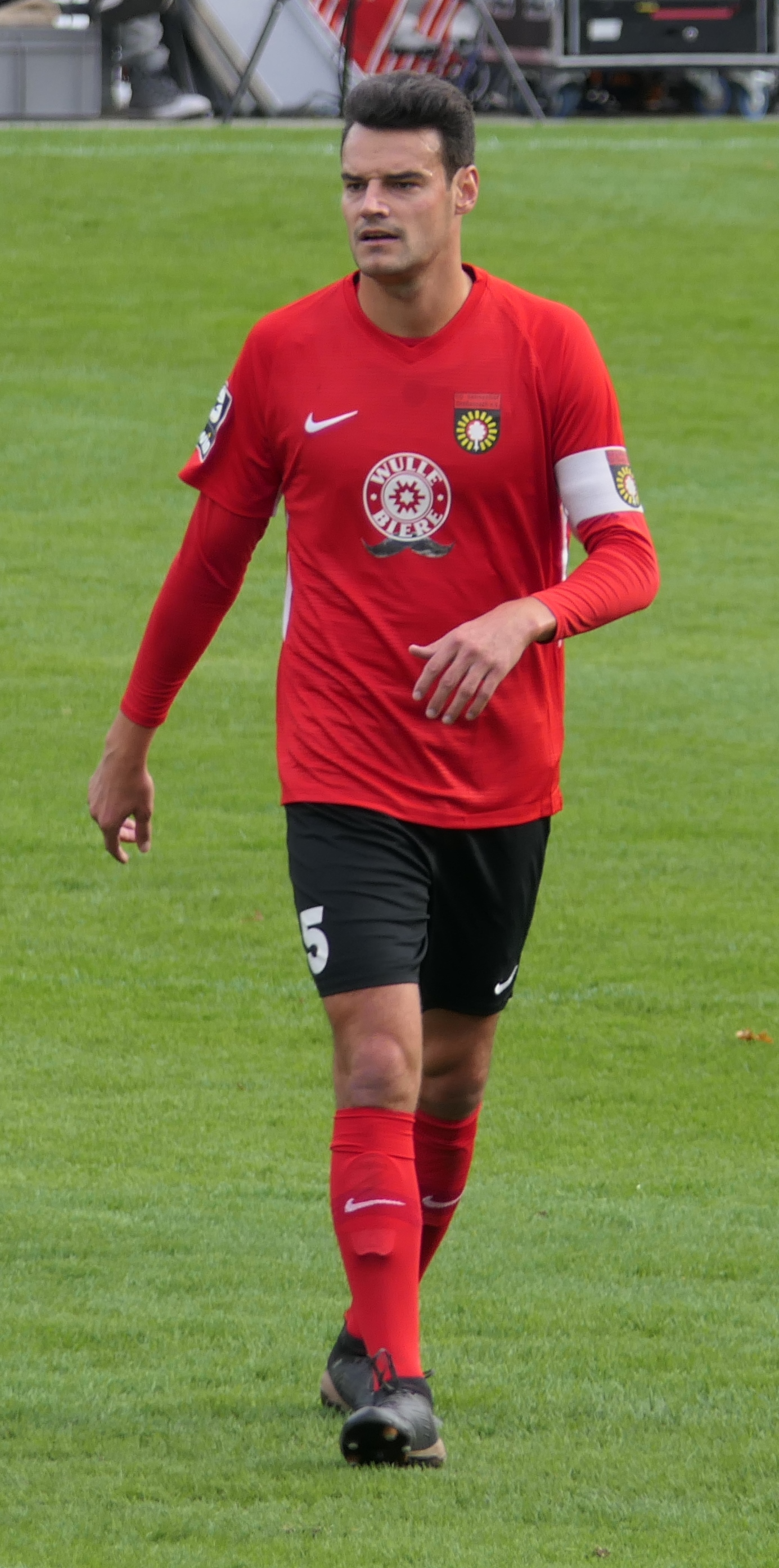 Der Fussballprofi Julian Leist im Trikot der SG Sonnenhof Großaspach beim Heimspiel gegen Eintracht Braunschweig am 27.10.2019.